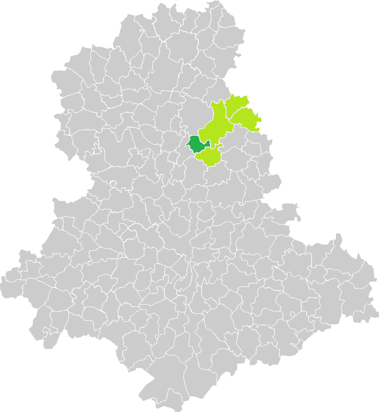 Carte de situation de la commune de Saint-Pardoux (en vert foncé) dans le votre Canton (en vert clair) sur une carte des communes de la Haute-Vienne